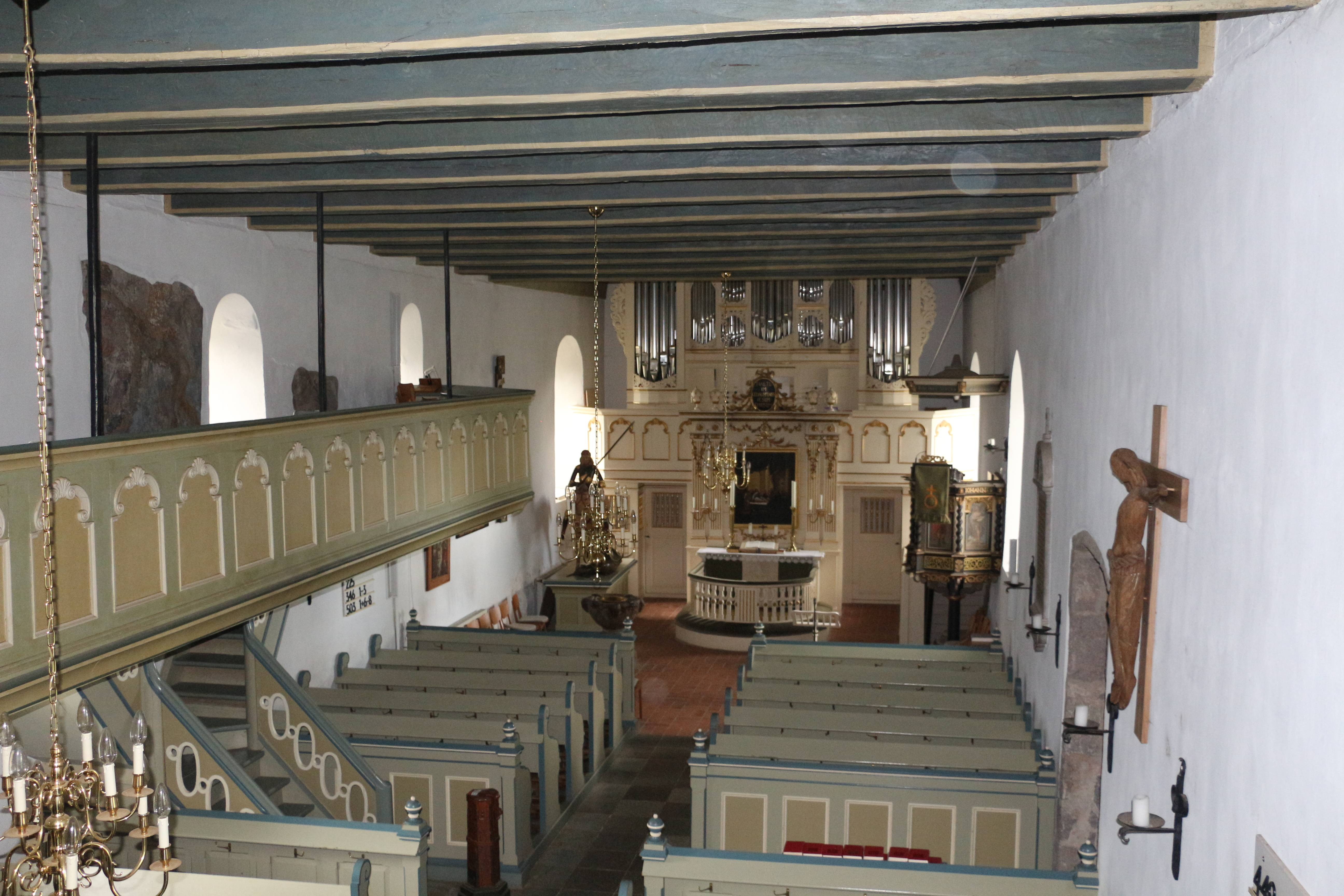 Innenraum der Wilhadikirche in Ulsnis von der Westempore aus gesehen